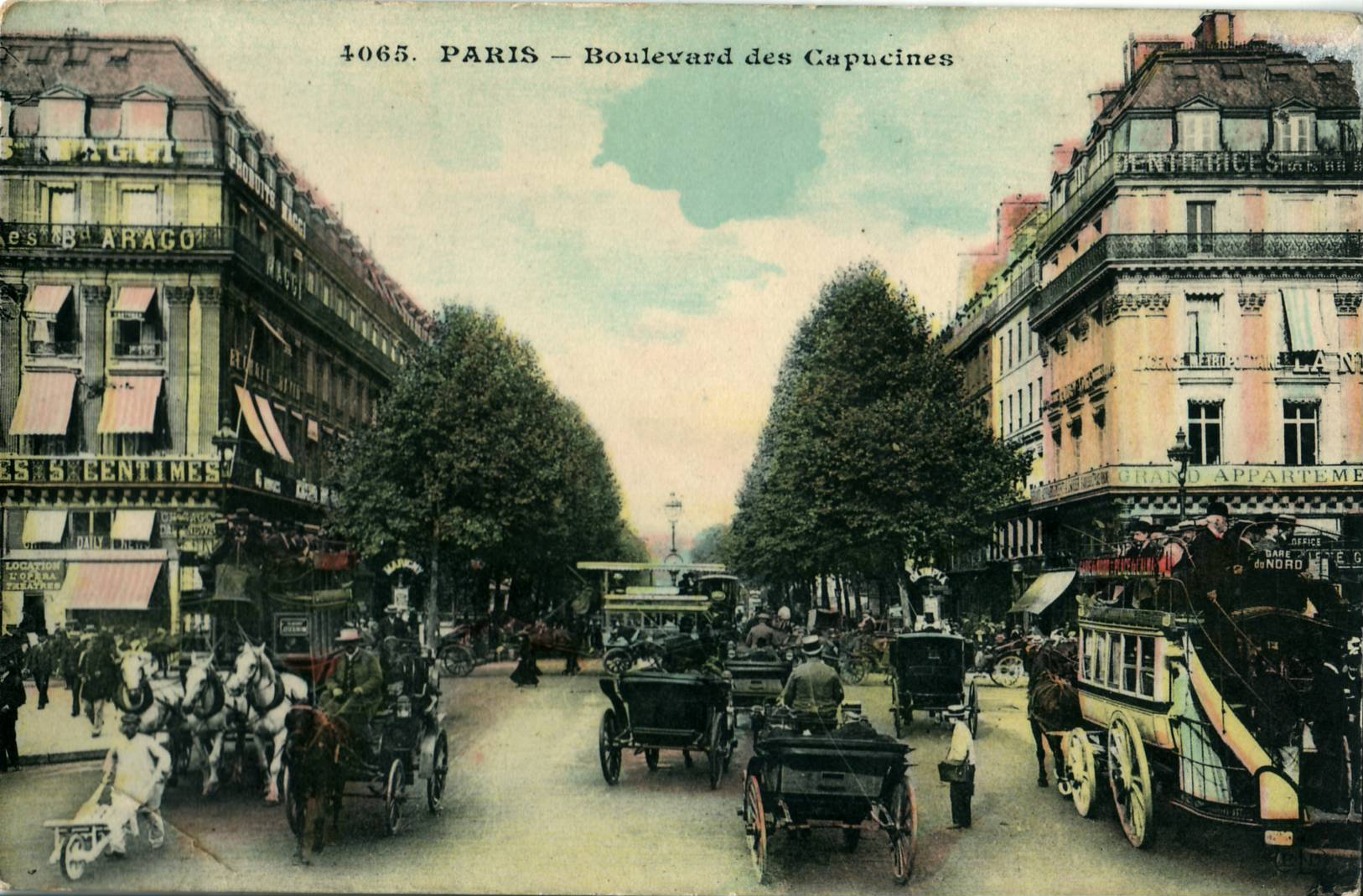 Carte postale ancienne, sans mention d'éditeur, N°4065Paris : Boulevard des CapucinesOn peut voir les nombreux modes de transports utilisés à l'époque : Omnibus à impériale découverte pour la Gare du Nord (CGO) à droite, automobiles, voitures à cheval, journalier poussant sa brouette